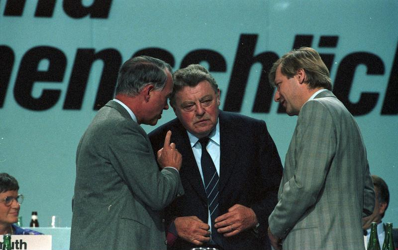 34. Bundesparteitag der CDU in der Rheingoldhalle, Mainz (6.-8.10.1986) 7.-8. Oktober 1986